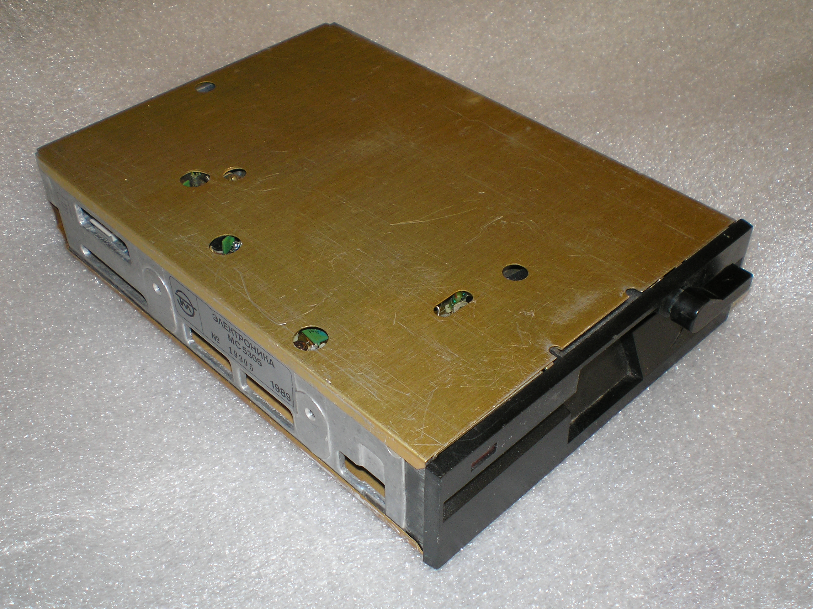 Soviet "Elektronika MS 5305" floppy drive.